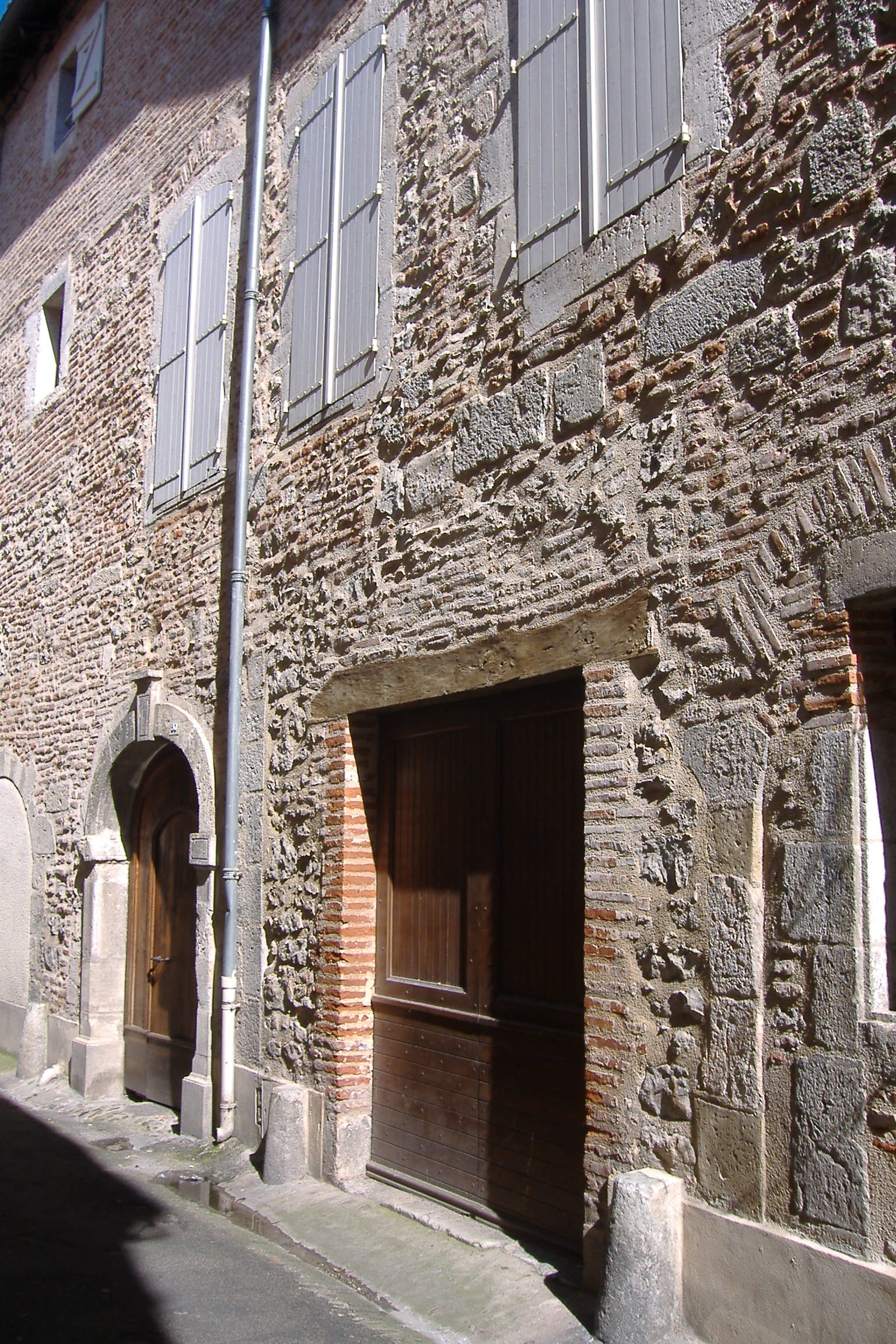 Hôtel de Baudus (XVIIe siècle) au 80 rue de Lastié à Cahors.